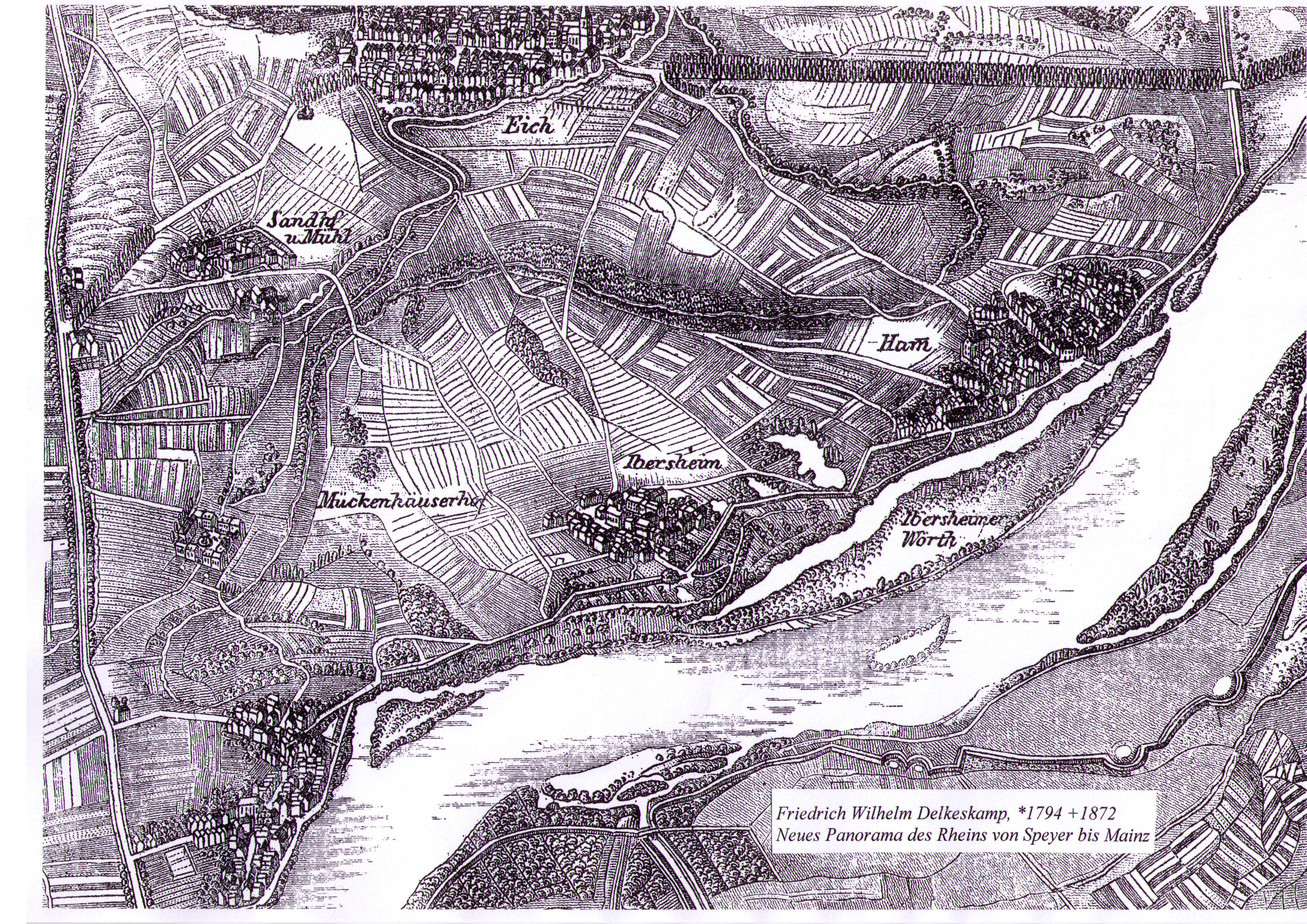 Friedrich Wilhelm Delkeskamp (1794 - 1872): Neues Panormama des Rheins und seiner nächsten Umgebungen von Speyer bis Mainz (1842) Ausschnitt-Vergrößerung von Edmund Ritscher, Herausgeber F. W. Delkeskamp, Frankfurt a. M., Stahlstich von P. Borninger, Druck von J. Back, Frankfurt a. M., Nachdruck auf Nyloprint, Original bei Buchhändler Wilhelm Hofmann, Ludwigshafen a. R.